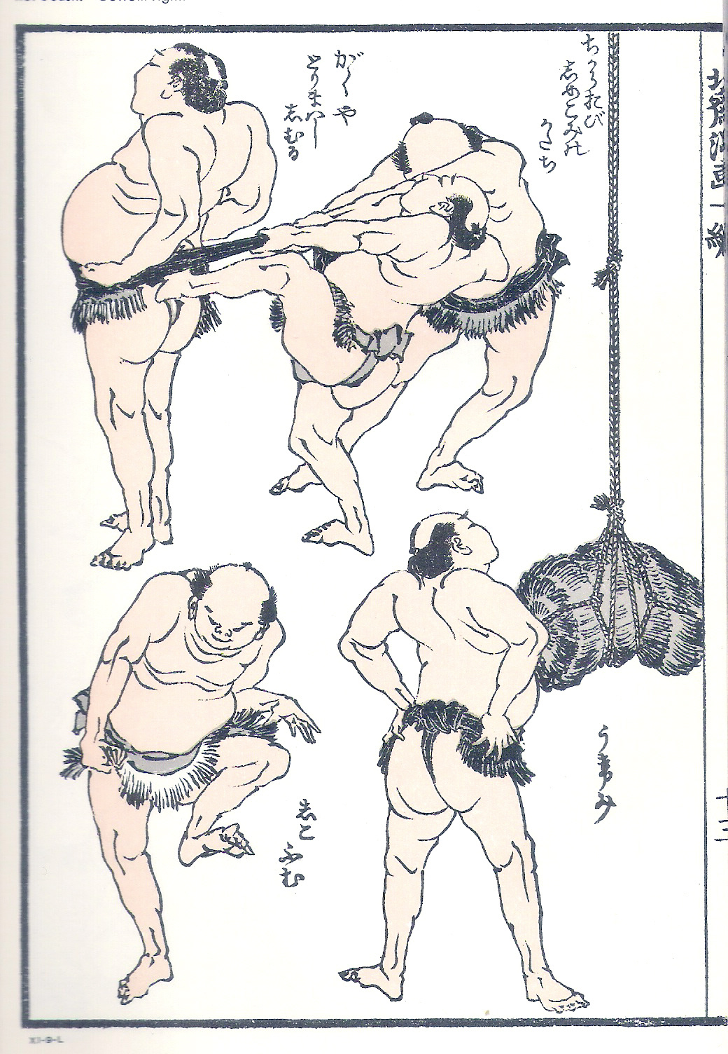 A page from Hokusai Manga